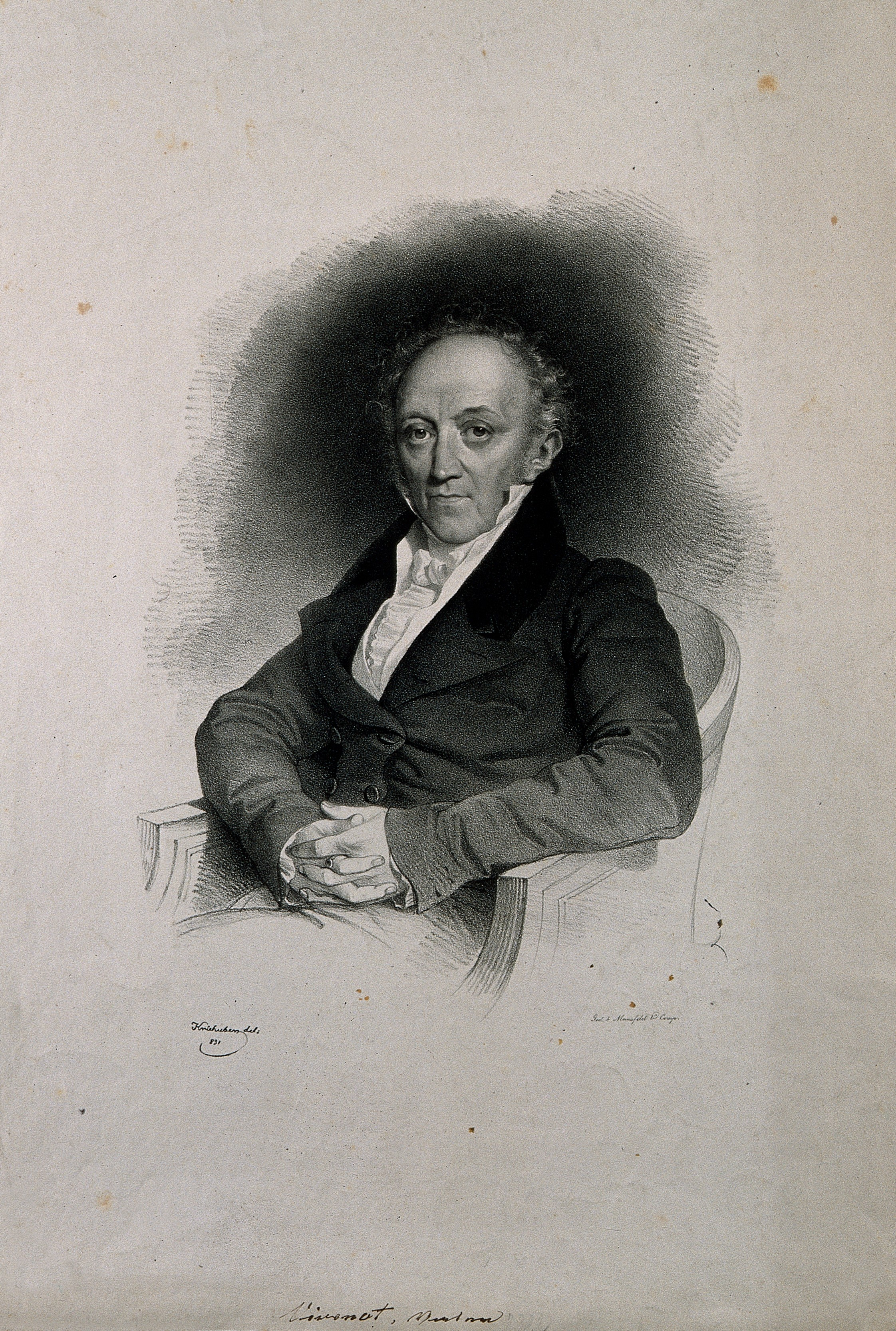 Genre/Technique: Portrait prints. Lithographs. Subject name: Vivenot, Dominik Edler von, 1764-1833.